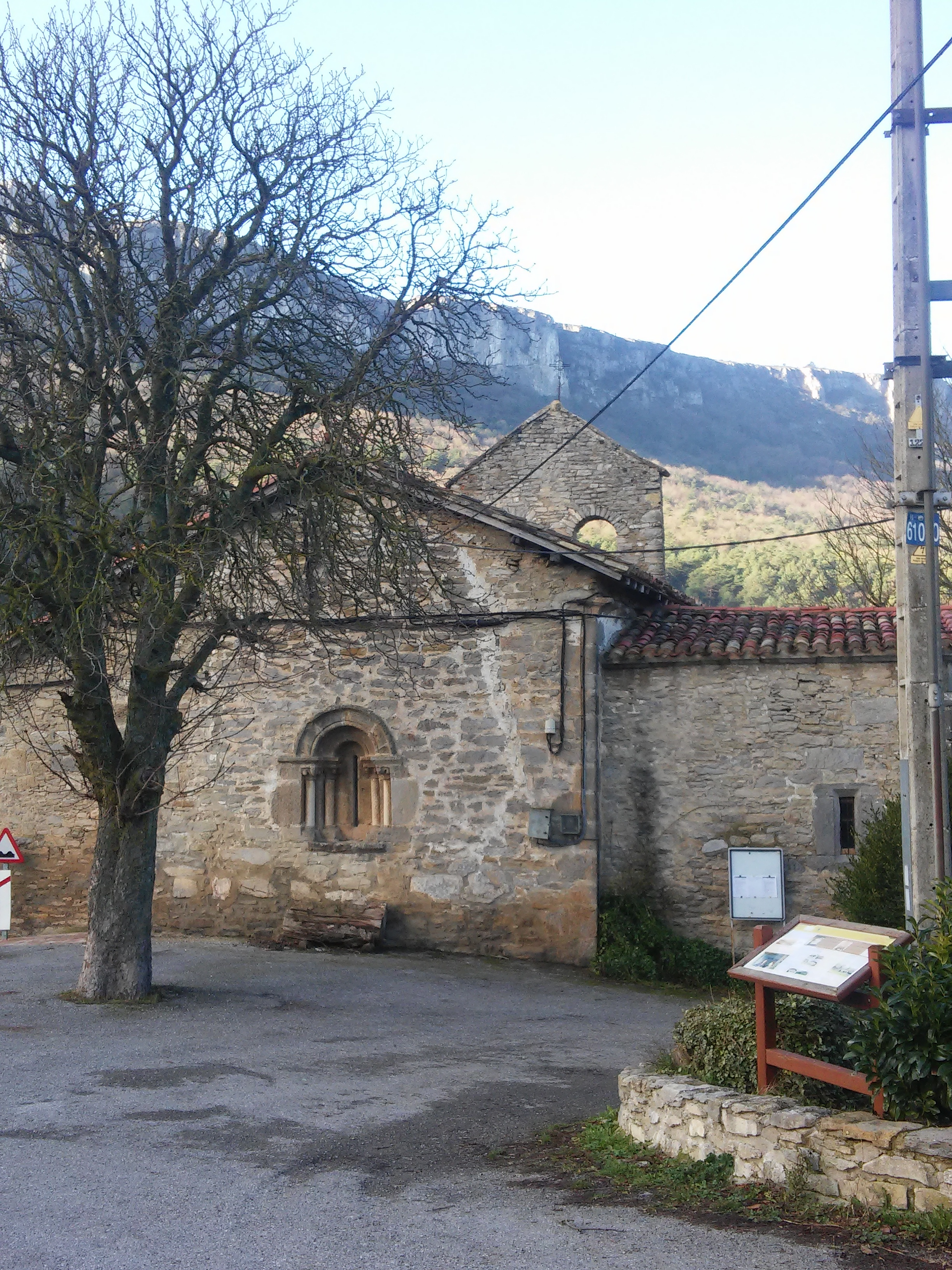 Aprikanoko eliza (Kuartango, Araba)